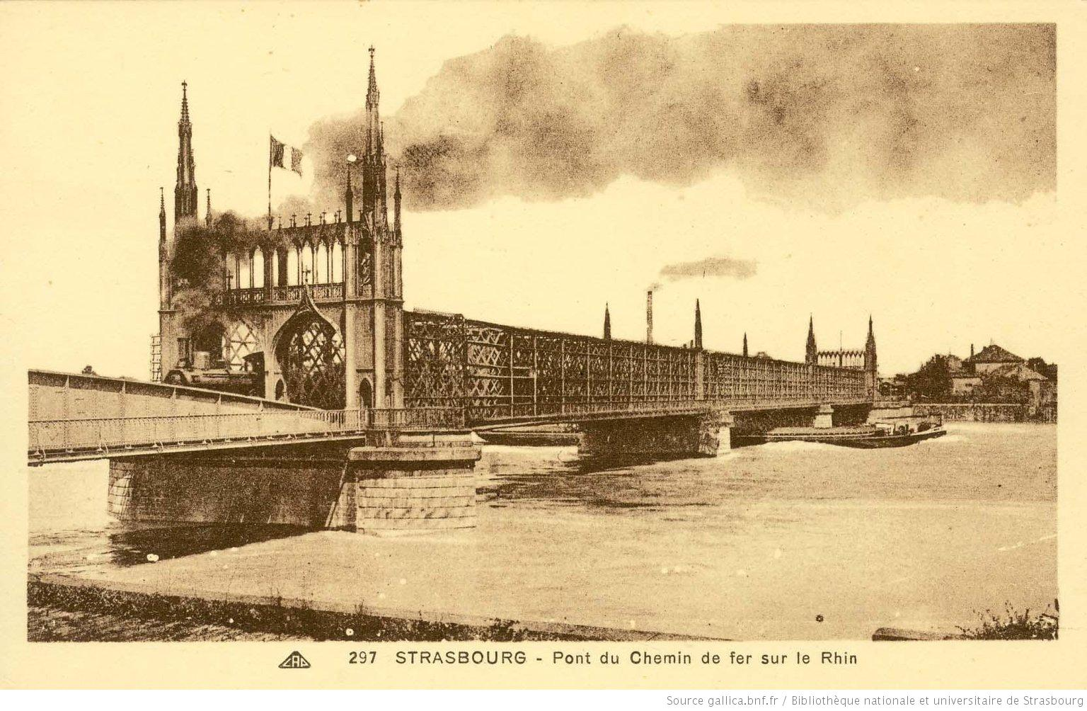 Carte postale montrant le pont de chemin de fer sur le Rhin, en 1920. Titre : Strasbourg - Pont du Chemin de fer sur le Rhin Éditeur : Cie alsacienne des arts photomécaniques (Strasbourg) Date d'édition : 1920 Sujet : Strasbourg (Bas-Rhin) -- Cartes postales Sujet : Cartes postales -- France -- Strasbourg (Bas-Rhin) Type : image fixe Langue : zxx Format : 1 carte postale : N/B ; 90x140 mm Format : image/jpeg Droits : domaine public Identifiant : ark:/12148/btv1b102225582 Source : Bibliothèque nationale et universitaire de Strasbourg, MCP001736 Relation : Description : Appartient à l’ensemble documentaire : BNUStr003 Provenance : bnf.fr Date de mise en ligne : 23/09/2013